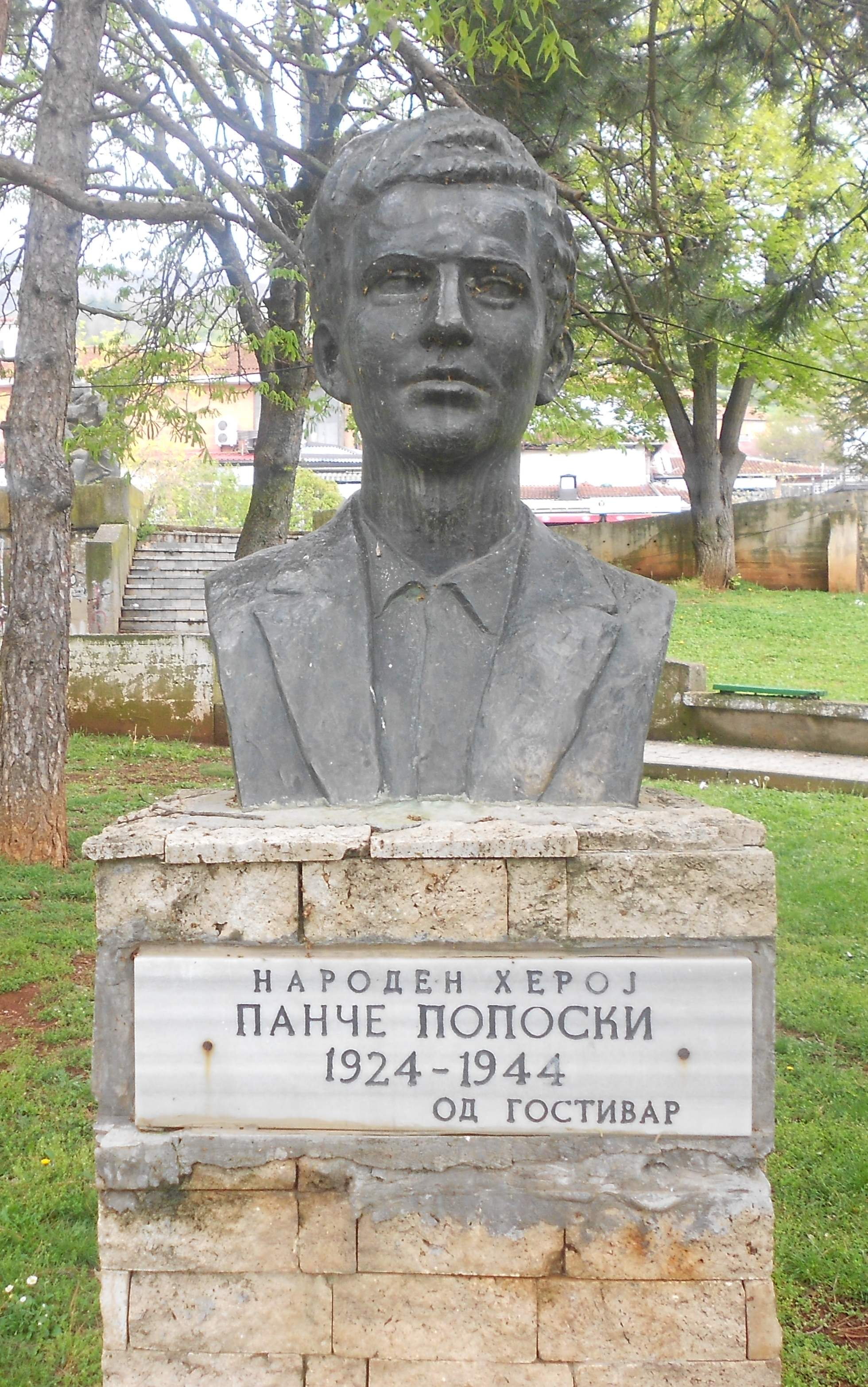 Биста на Панче Попоски во Дебар